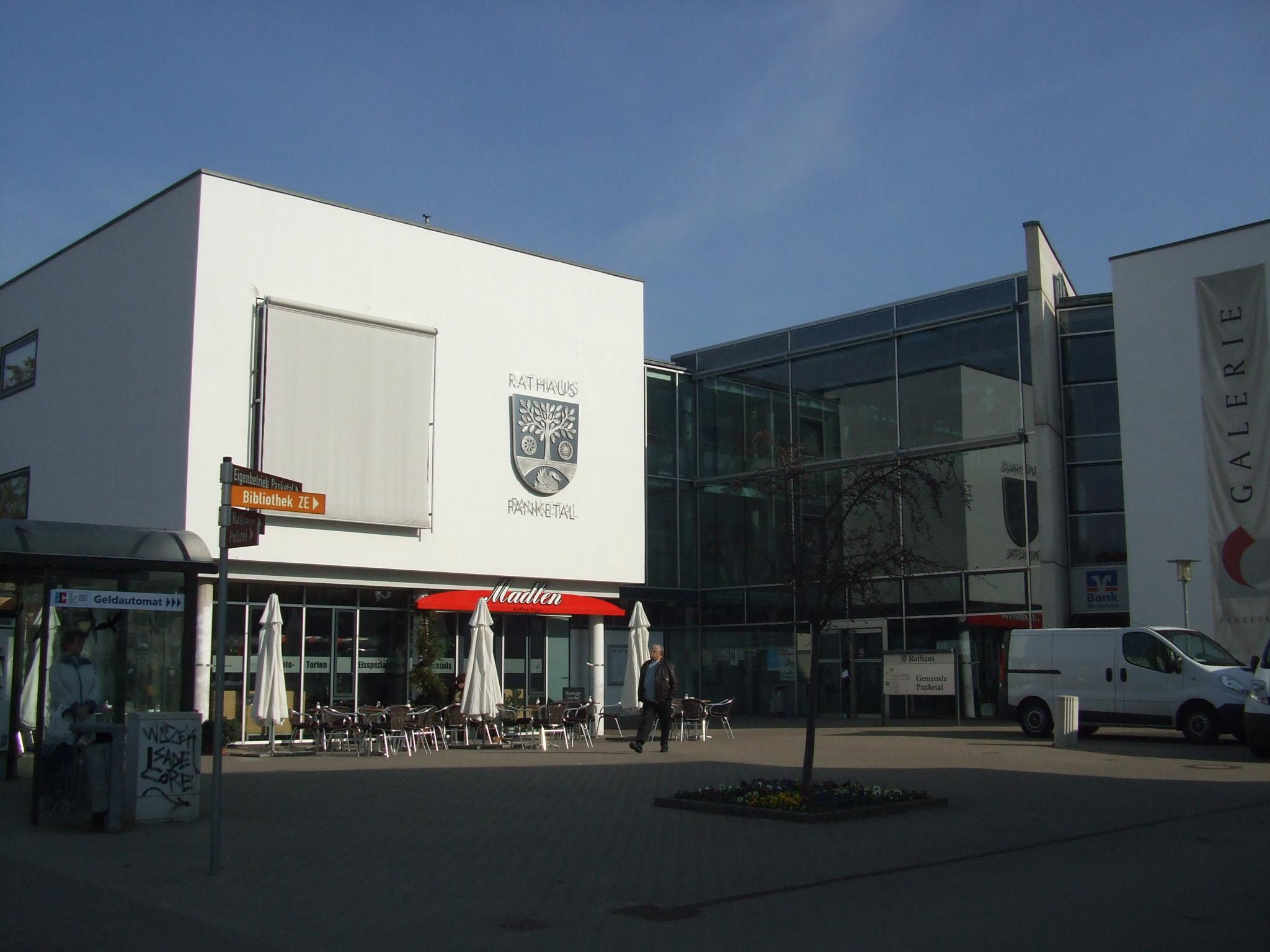 Rathaus Panketal in Zepernick im April 2010.